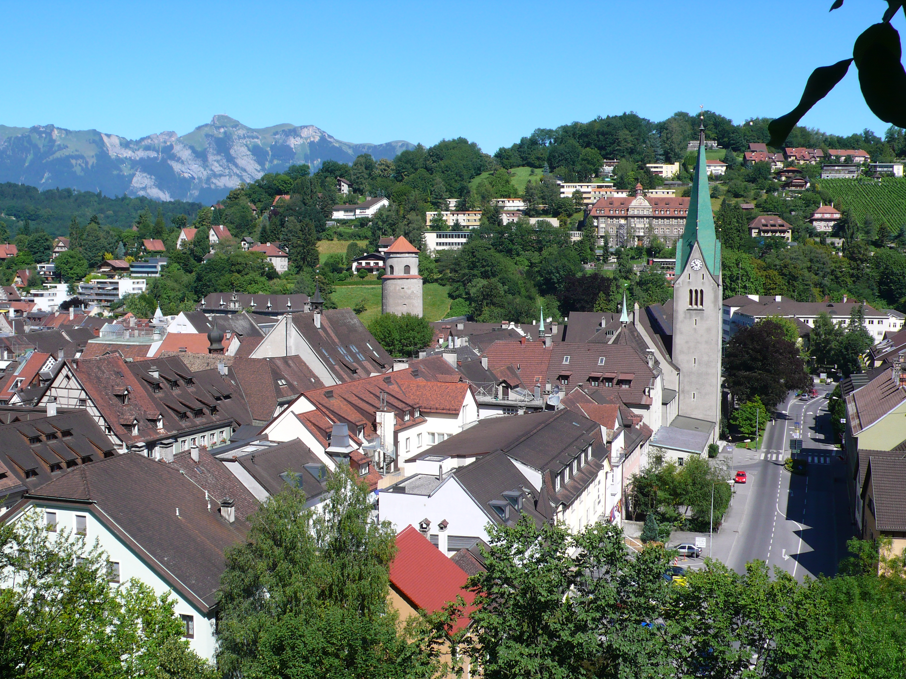 Feldkirch, Vorarlberg